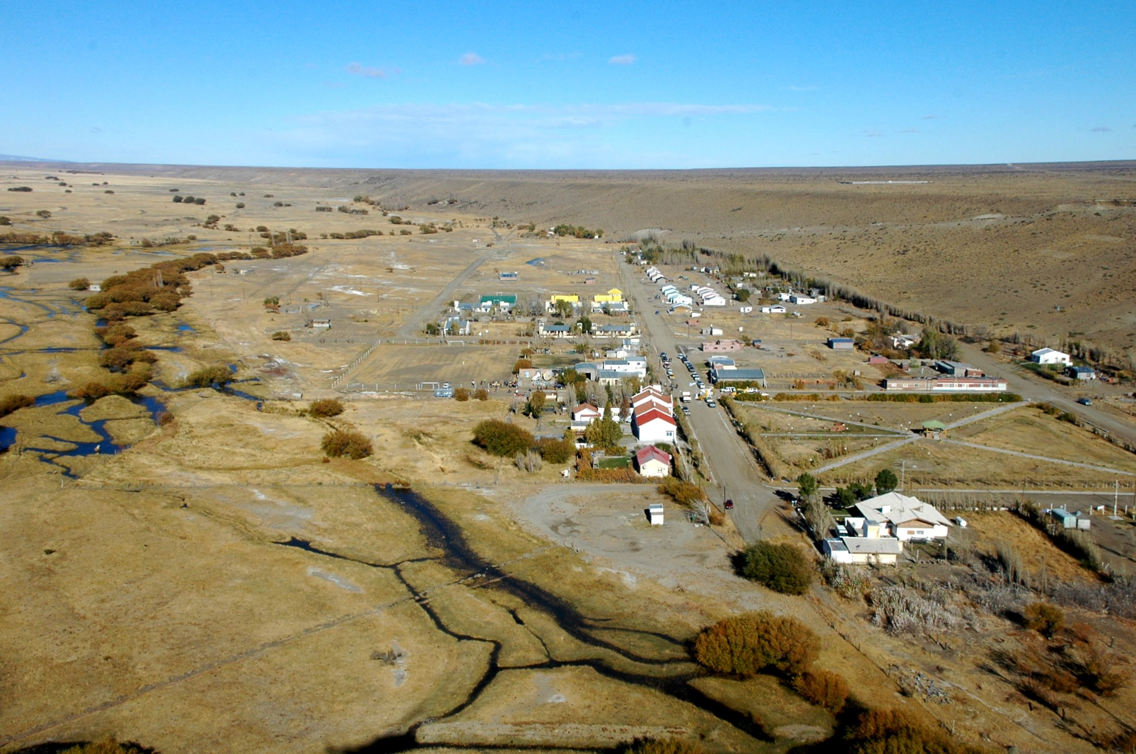 Vista aérea de la pequeña y hermosa localidad de Facundo, costeada por el Río Senguer. Mayo del 2007. Pamela Fernández